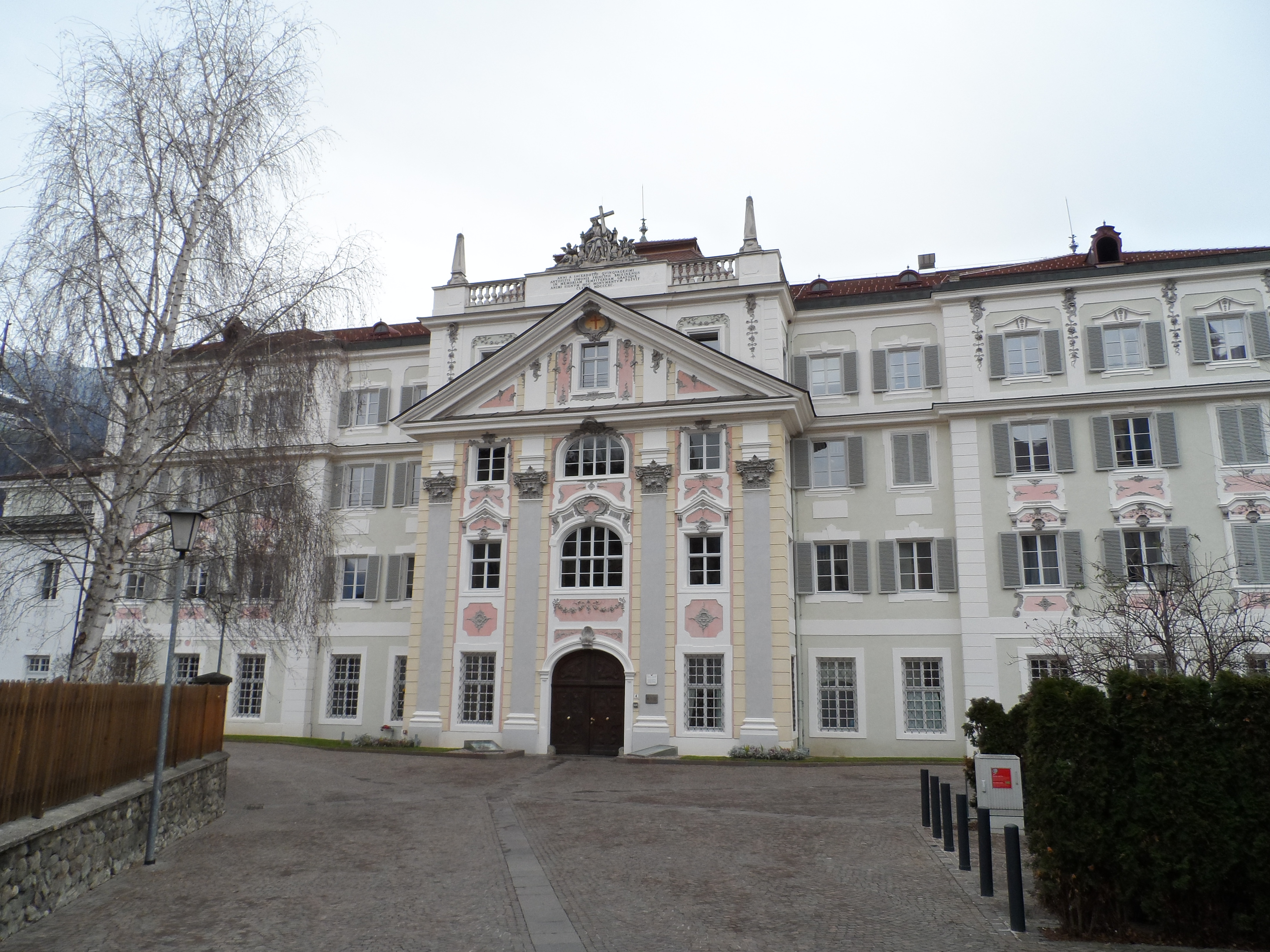 Priesterseminar - Seminarplatz 4, Brixen